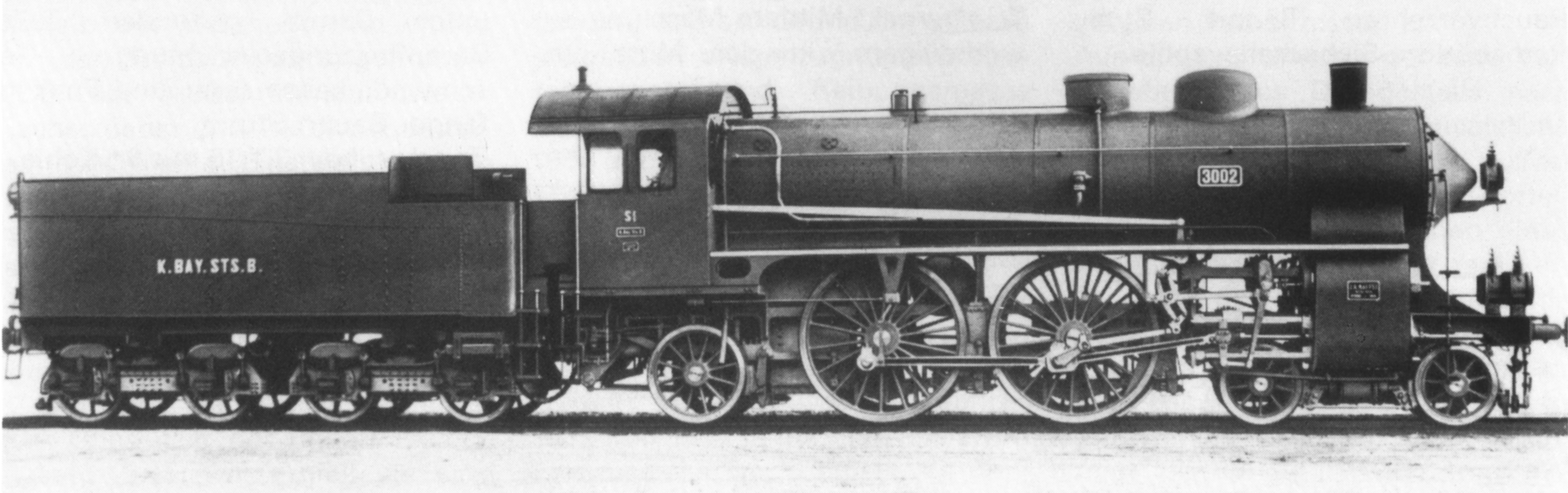 Dampflokomotive Bayerische S 2/5.